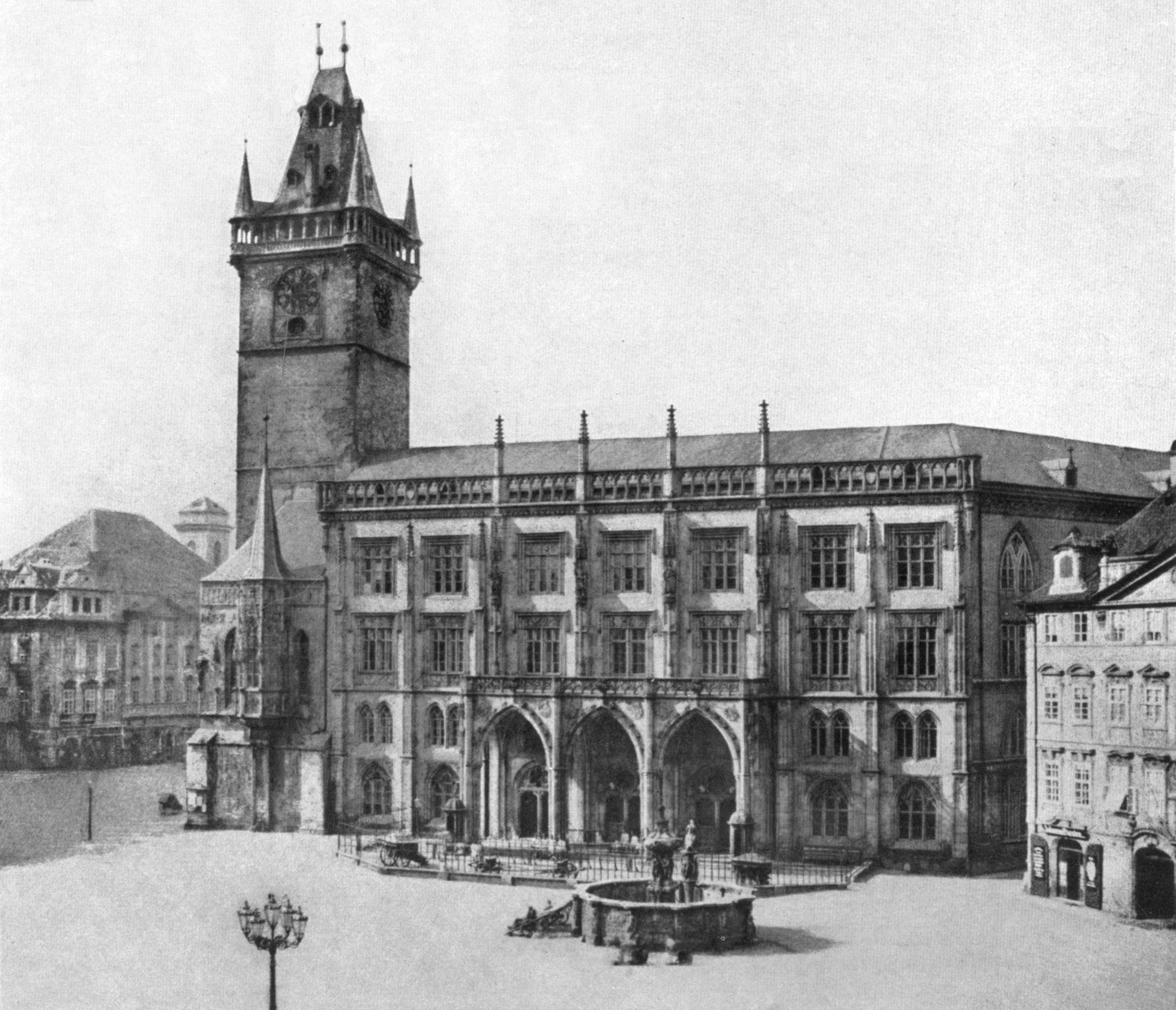 A. Groll - Východní průčelí staroměstské radnice v Praze, 1856